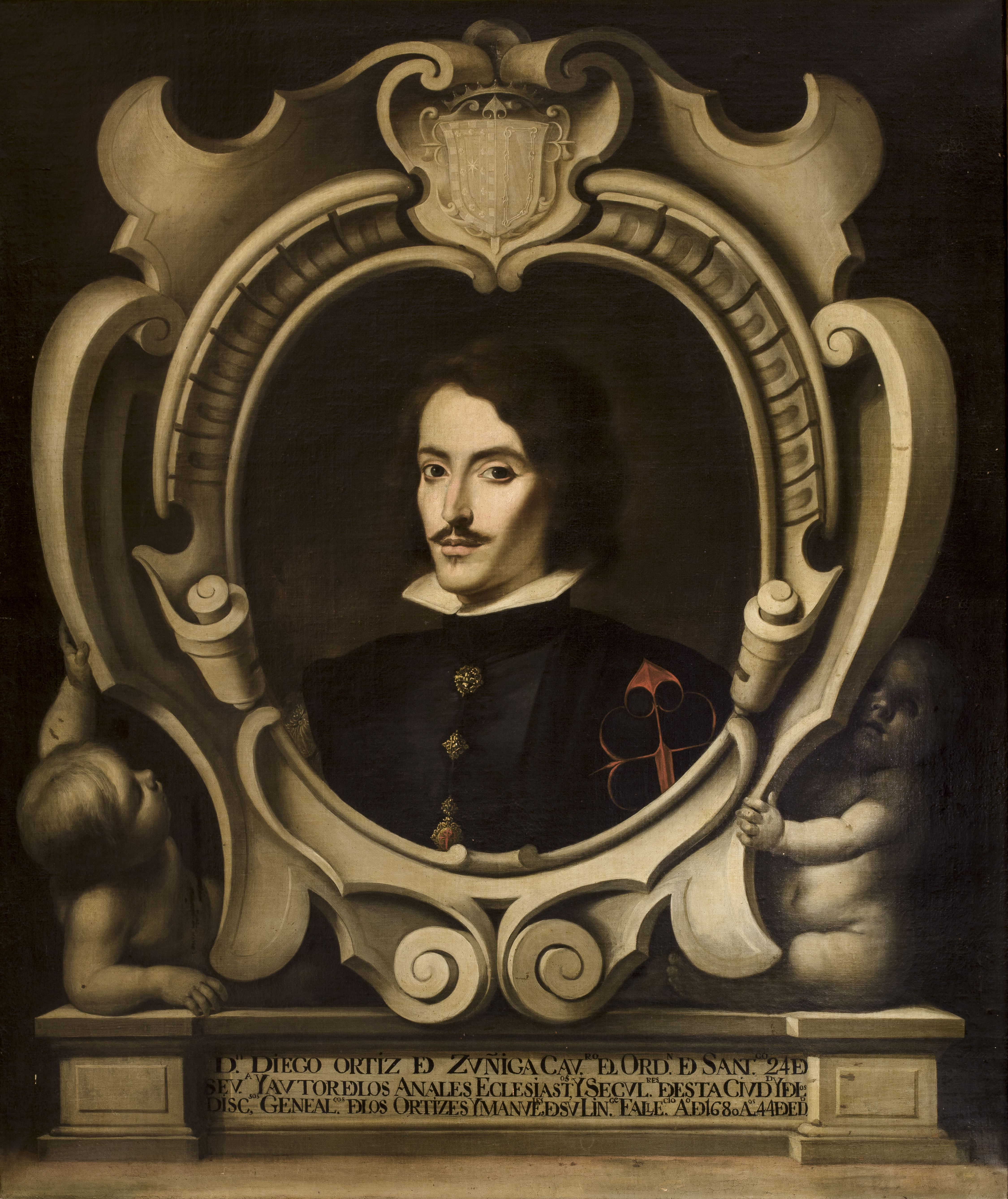 Retrato póstumo del aristócrata e historiador Diego Ortiz de Zúñiga (1633-1680), que fue caballero de la Orden de Santiago y Veinticuatro de Sevilla. Esta obra es una copia realizada en 1751 del original que pintó Bartolomé Esteban Murillo hacia 1653, y procede del antiguo colegio agustino de San Acacio, que fue convertido posteriormente en biblioteca municipal, y al que fue donado por el nieto del historiador Diego Ortiz de Zúñiga, llamado José Ortiz de Zúñiga, que era marqués de Montefuerte.